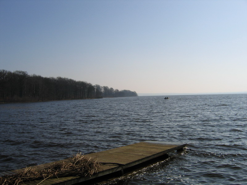 Ringsjön in Sweden